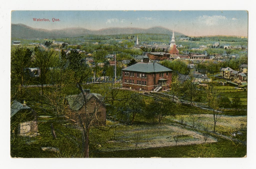 Waterloo, carte postale, Journal de Waterloo